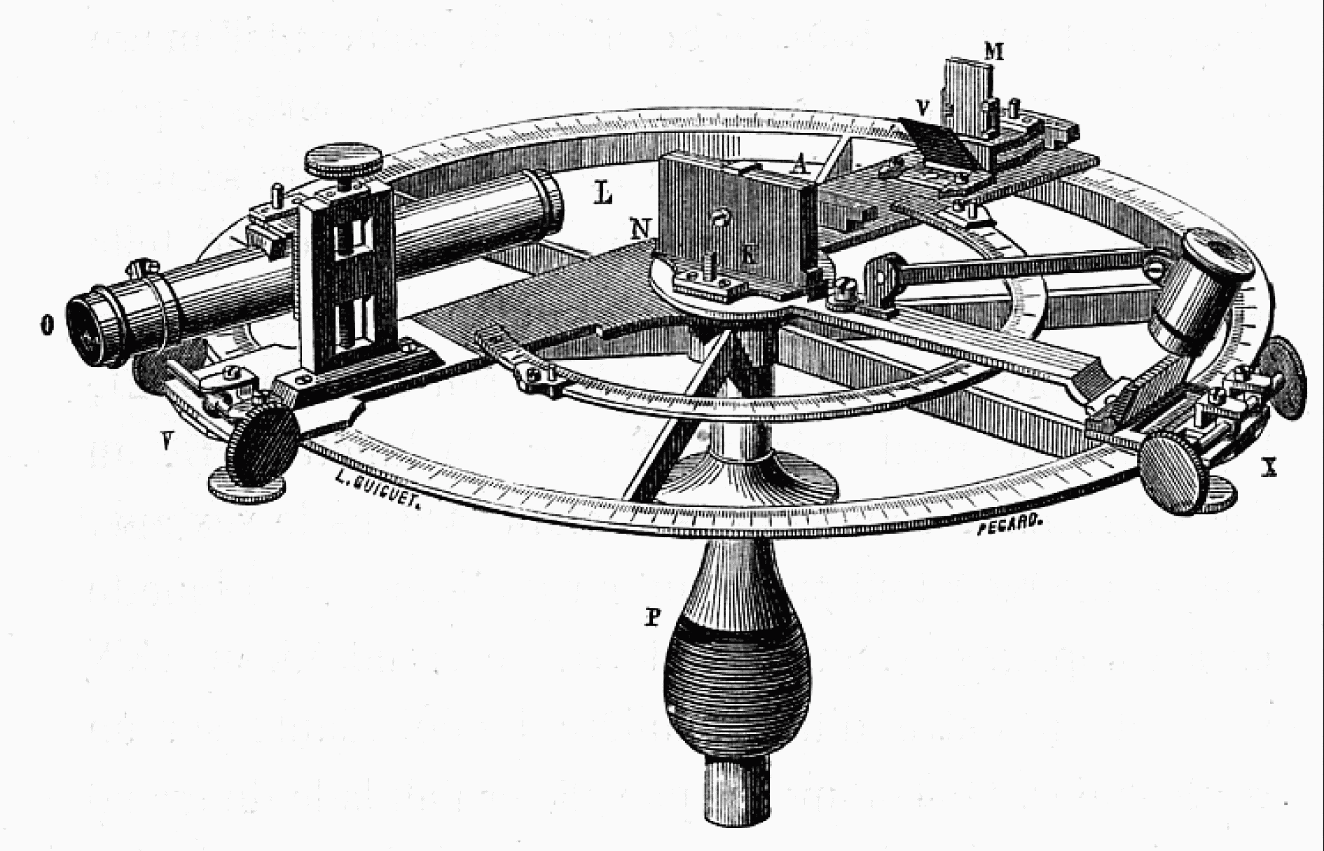 Fig. 362. — Cercle de réflexion.